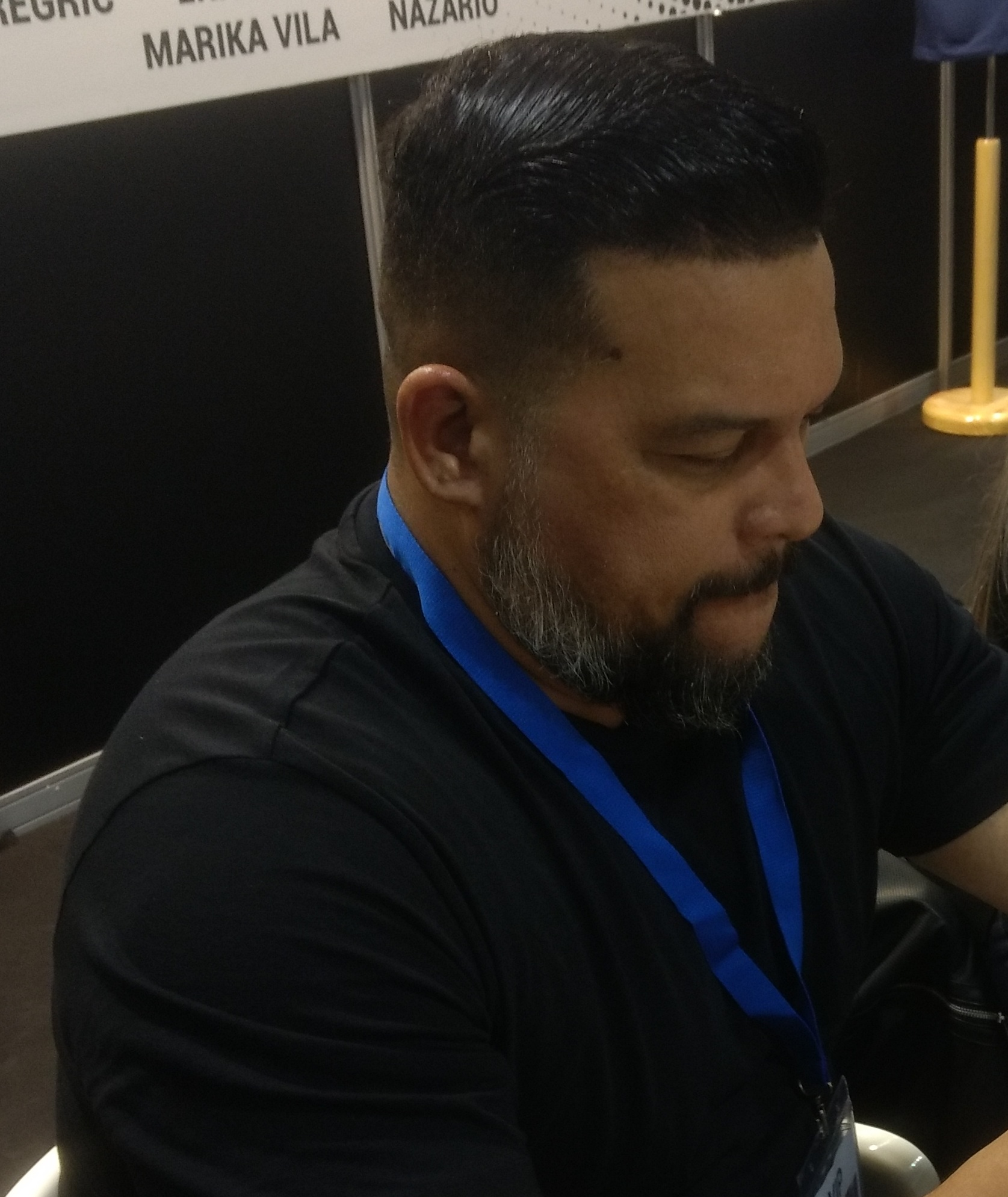 El dibuixant de còmics brasiler Joe Bennett.